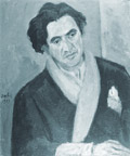 Portrait de l'écrivain Louis Guilloux en 1935, par Eugène Dabit (1898-1936)